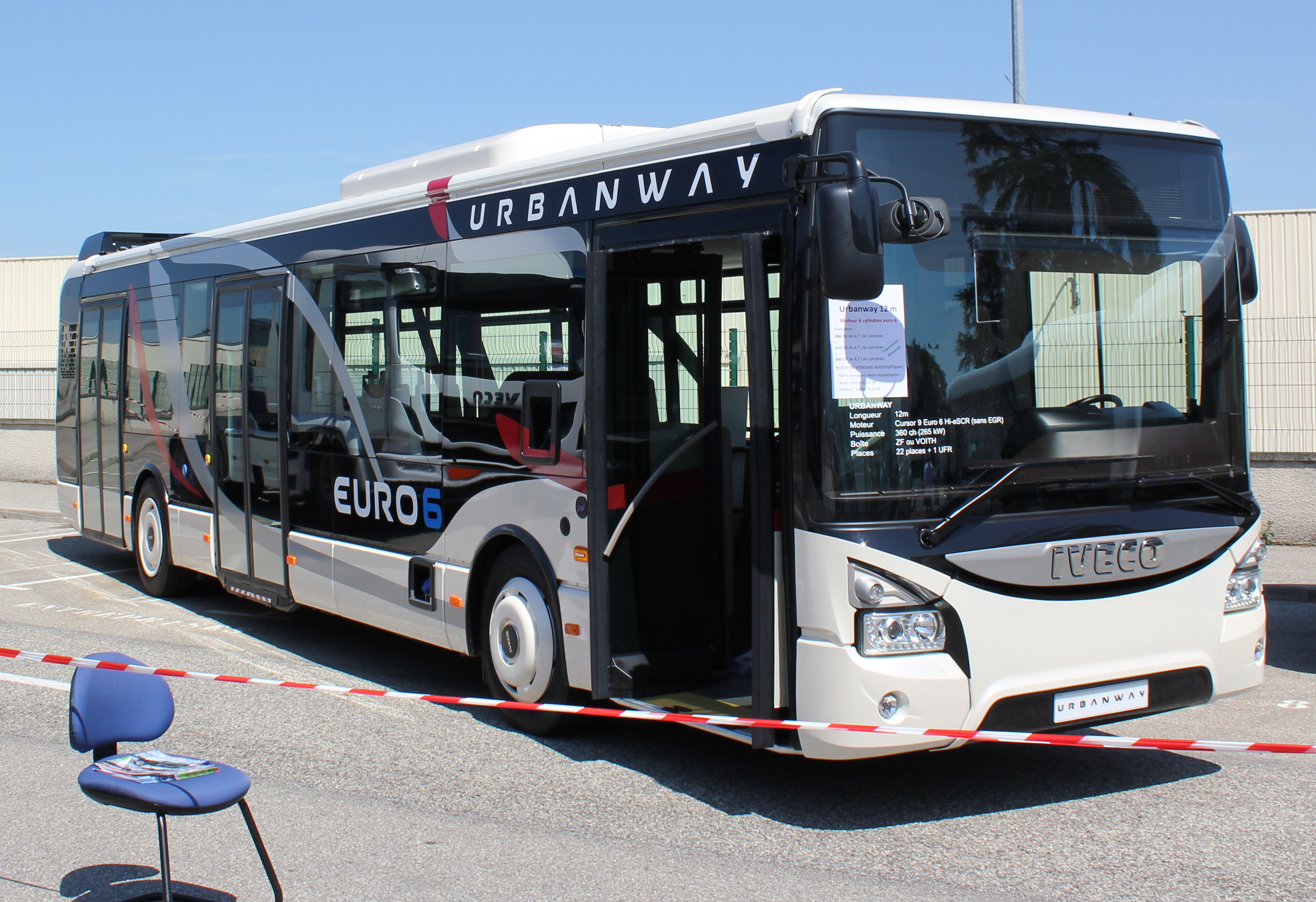 L'Iveco Urbanway est exposé lors de la journée portes ouvertes à l'usine d'Annonay